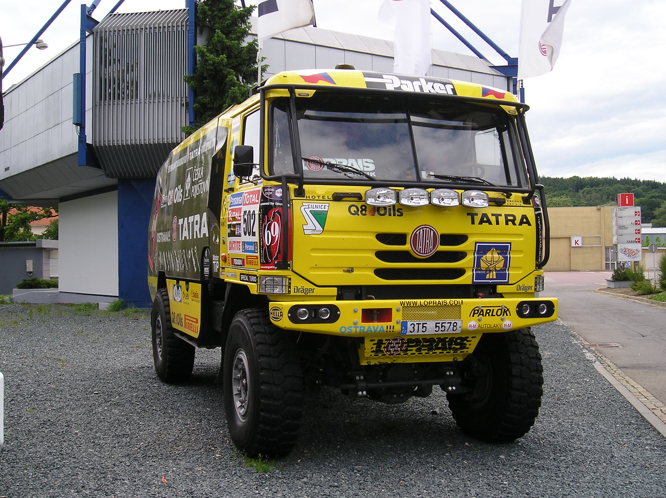 Autotec 2010